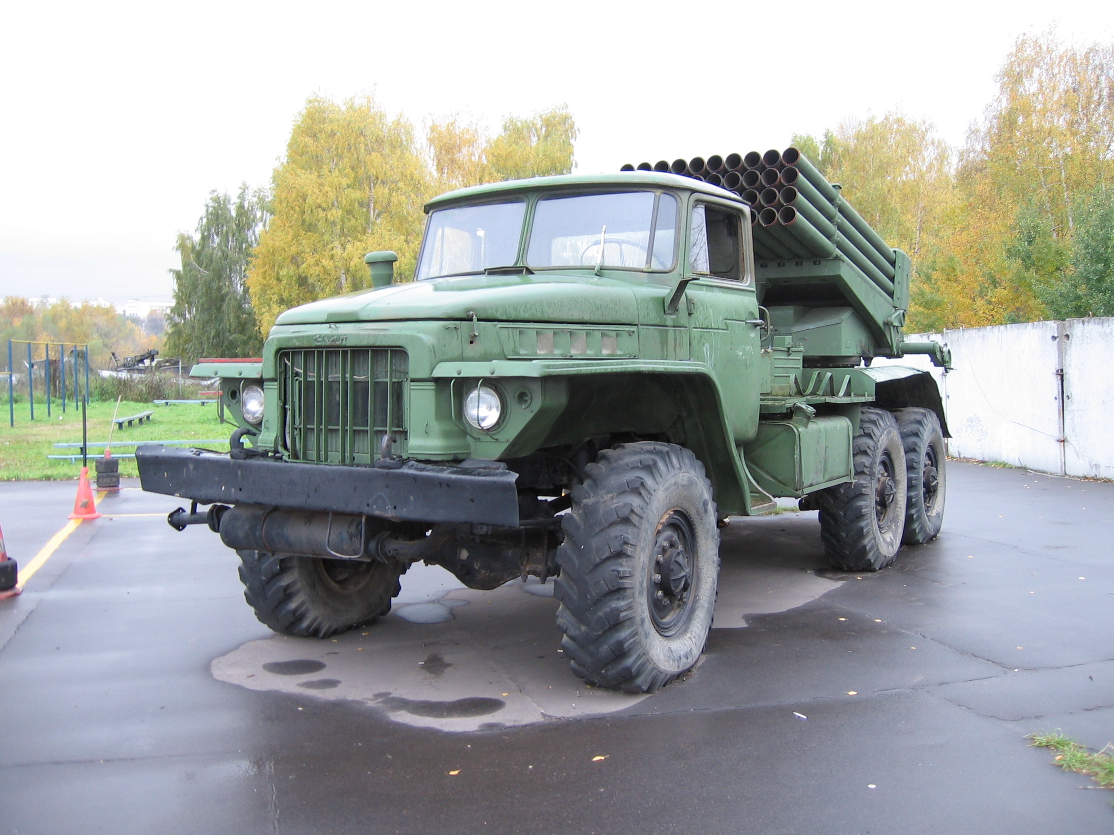 ural-375 BM-21 GRAD